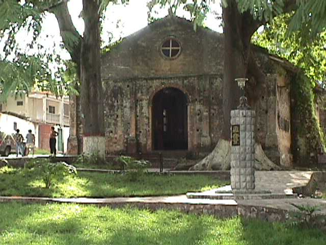 Guanaguana población de norte del estado Monagas - Venezuela (1998)